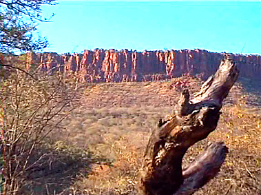 Waterberg-Plateau, Namibia 1998